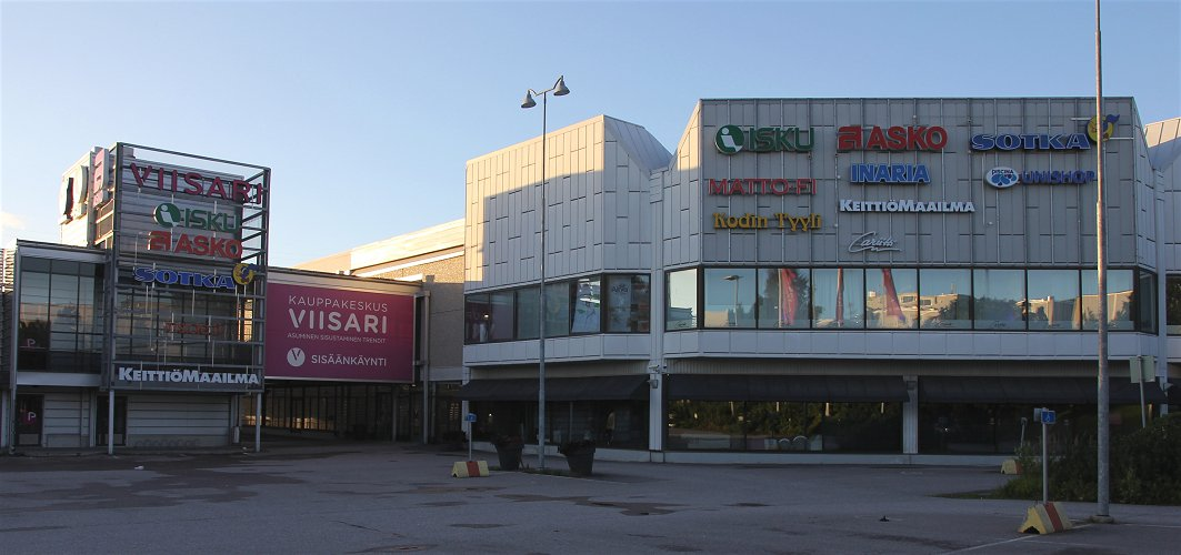 Huonekalualan kauppakeskus Viisari Vantaan Varistossa.